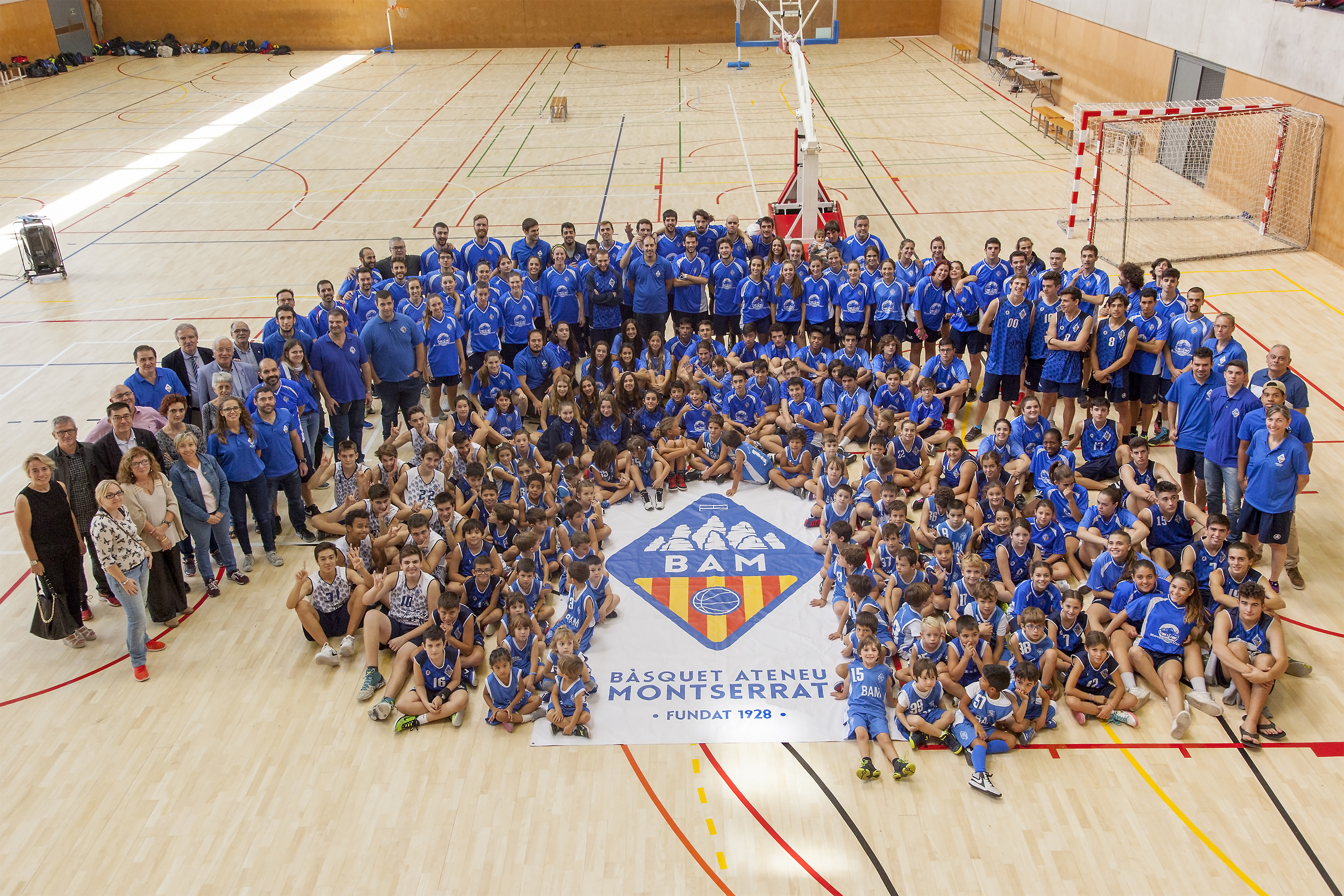 Grup d'alumnes del BAM al 2017